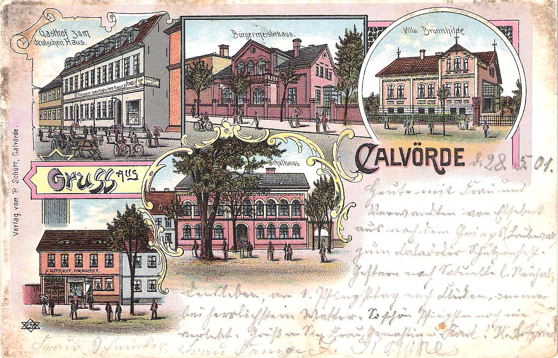 Scann, Farbige Mehrbilderpostkarte aus Calvörde, gelaufen 1901